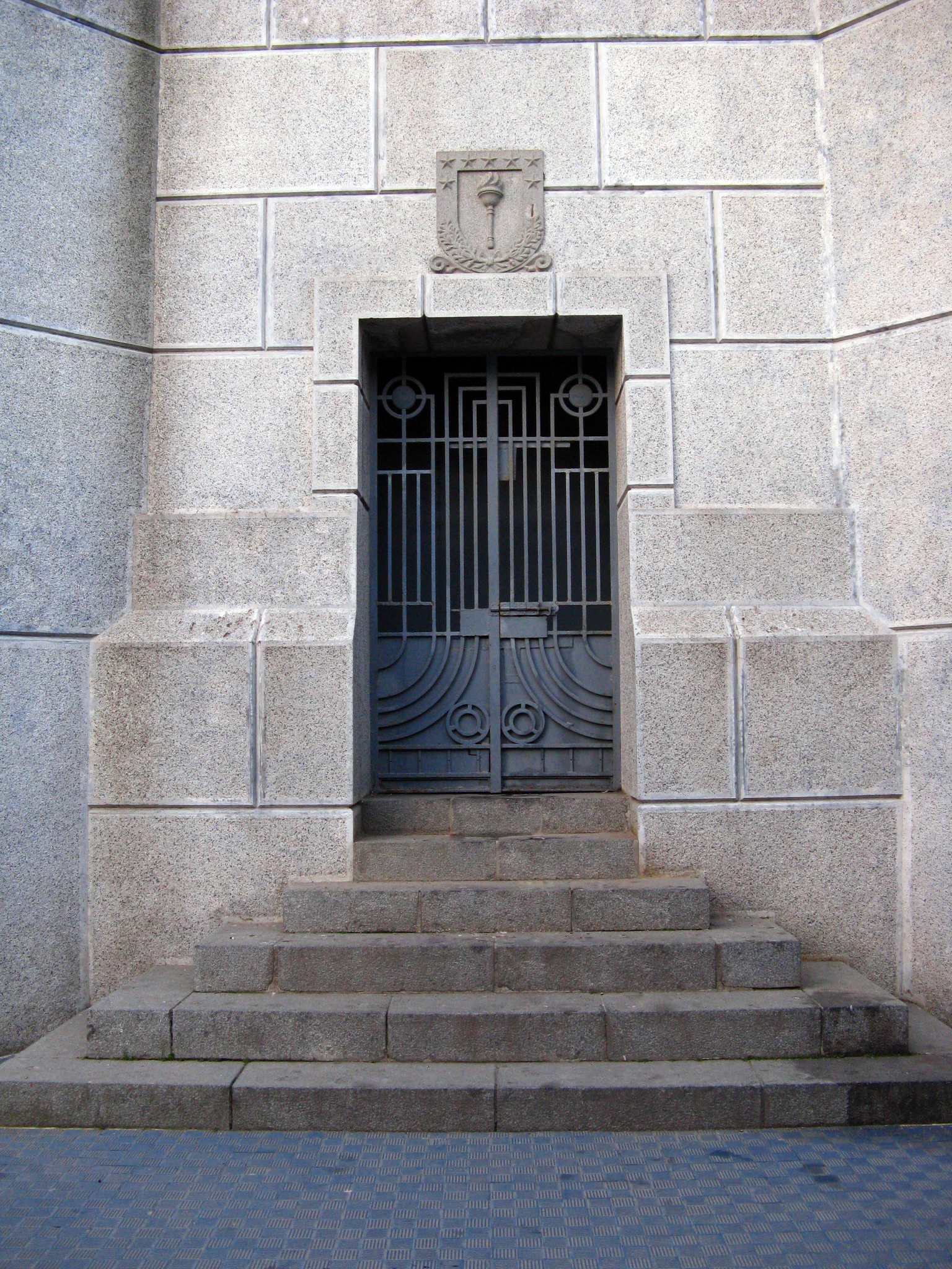 Entrada al Campanil de la Universidad de Concepción. Concepción, Chile. Fecha: abril de 2010.